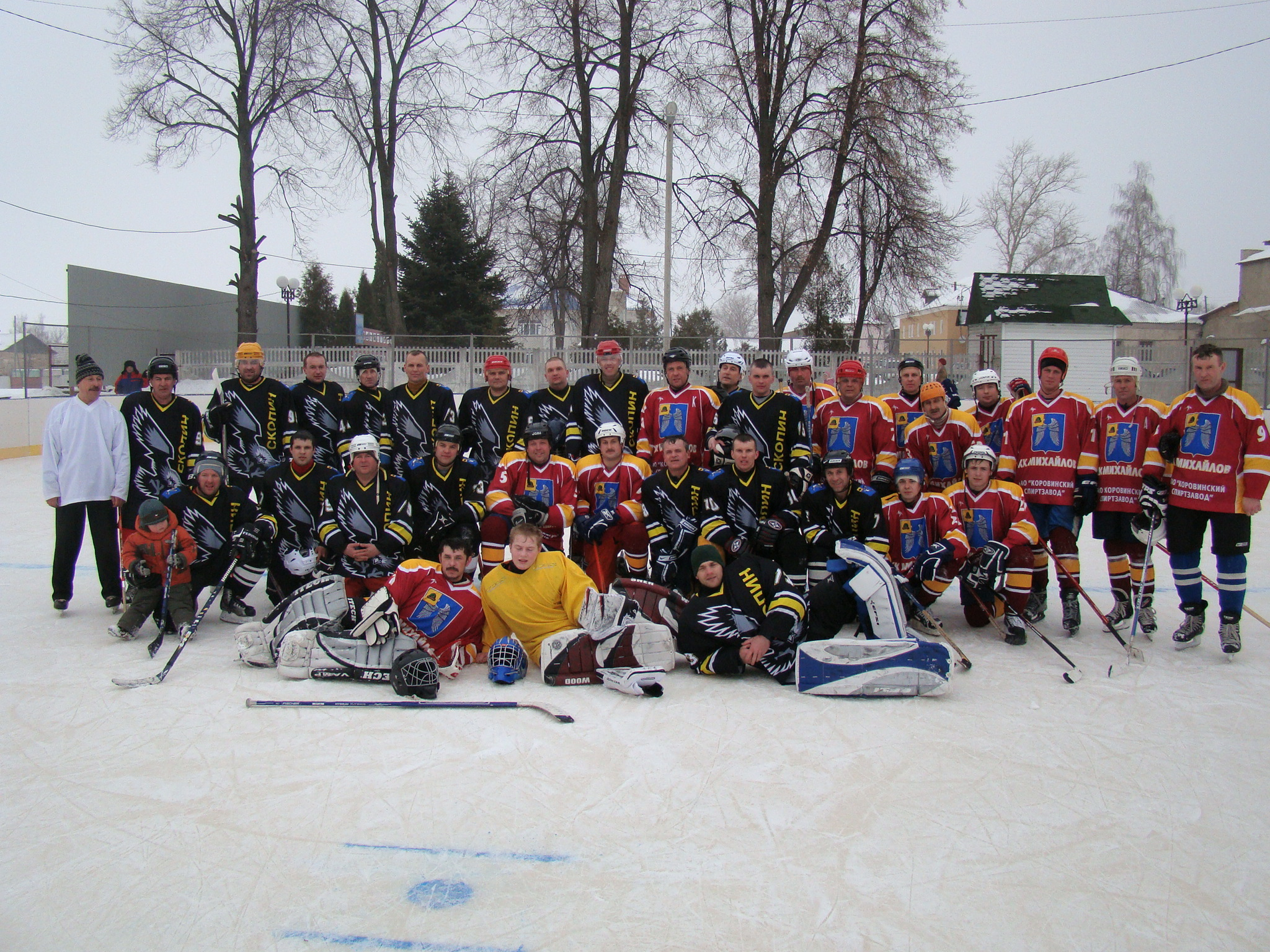 Любительская сборная г.Скопина по хоккею